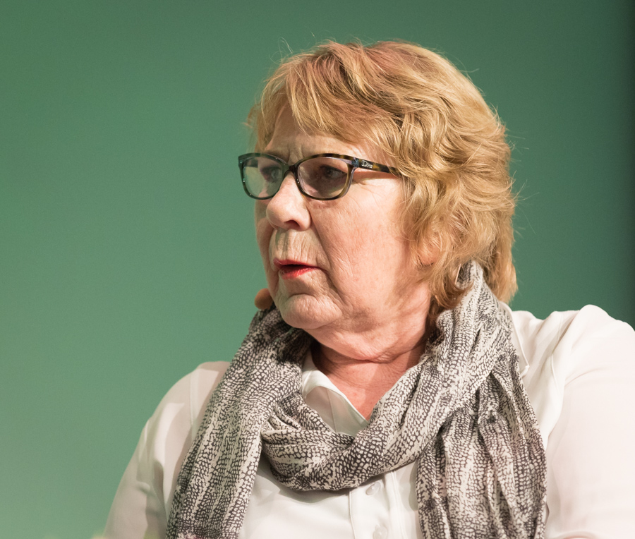 Anne Grosvold på Senterpartiets landsmøte 2017. Møtet fant sted i Trondheim på Scandic Hotel Lerkendal mellom 23 og 26. mars 2017.